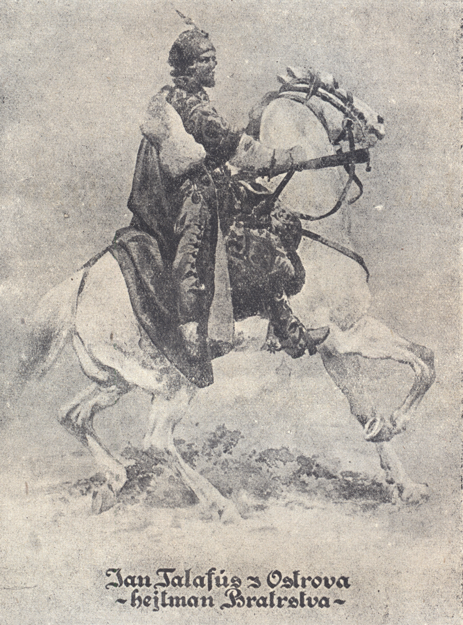 Česky: Jan Talafús z Ostrova